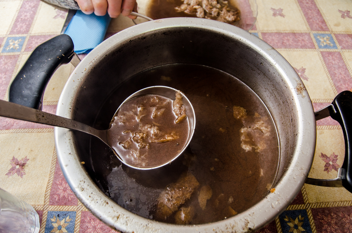 Calducho de hervir las morcillas, preparado para ser consumido.